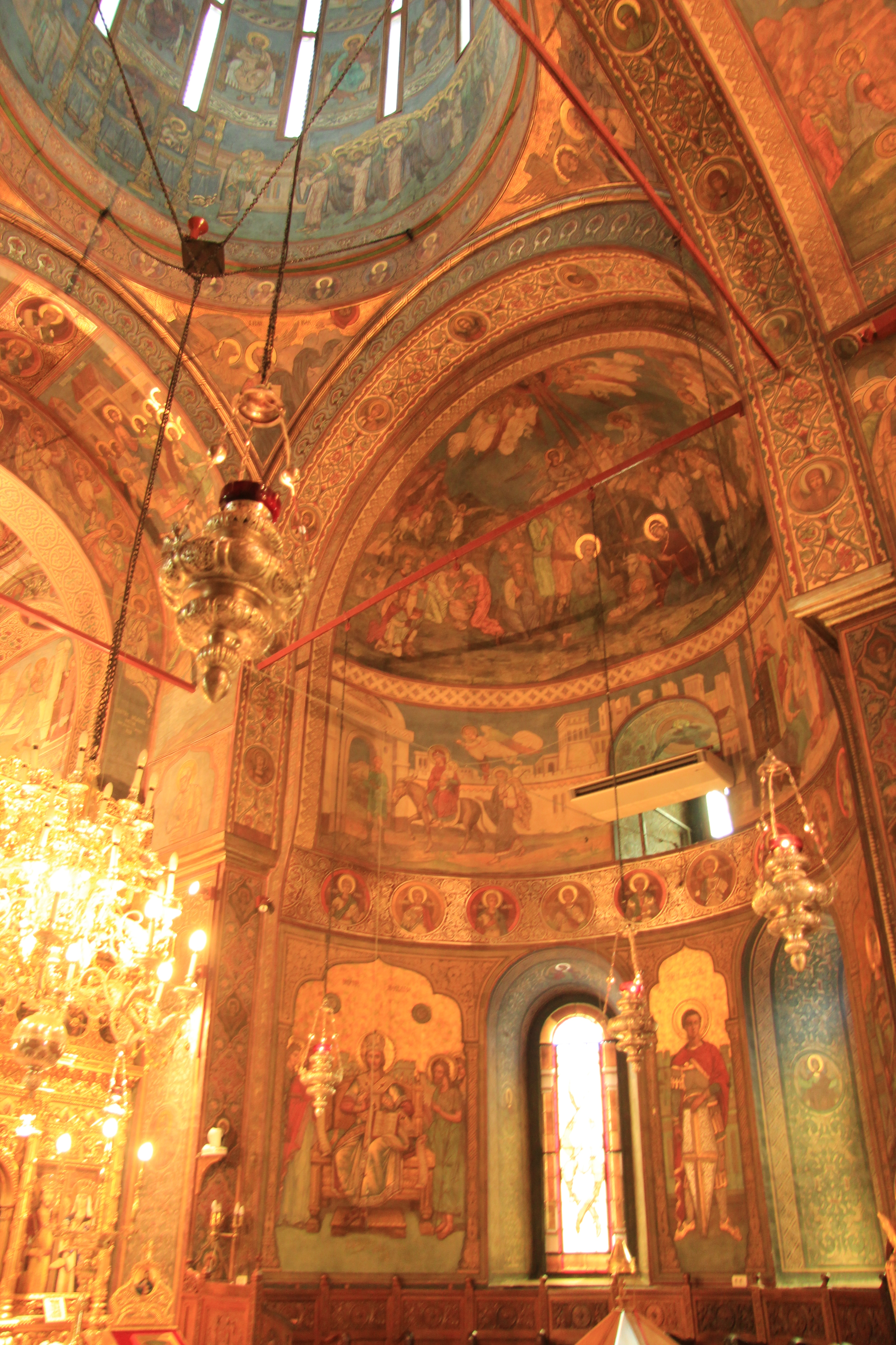 Rumänisch-orthodoxe Kathedrale in Bukarest, Rumänien